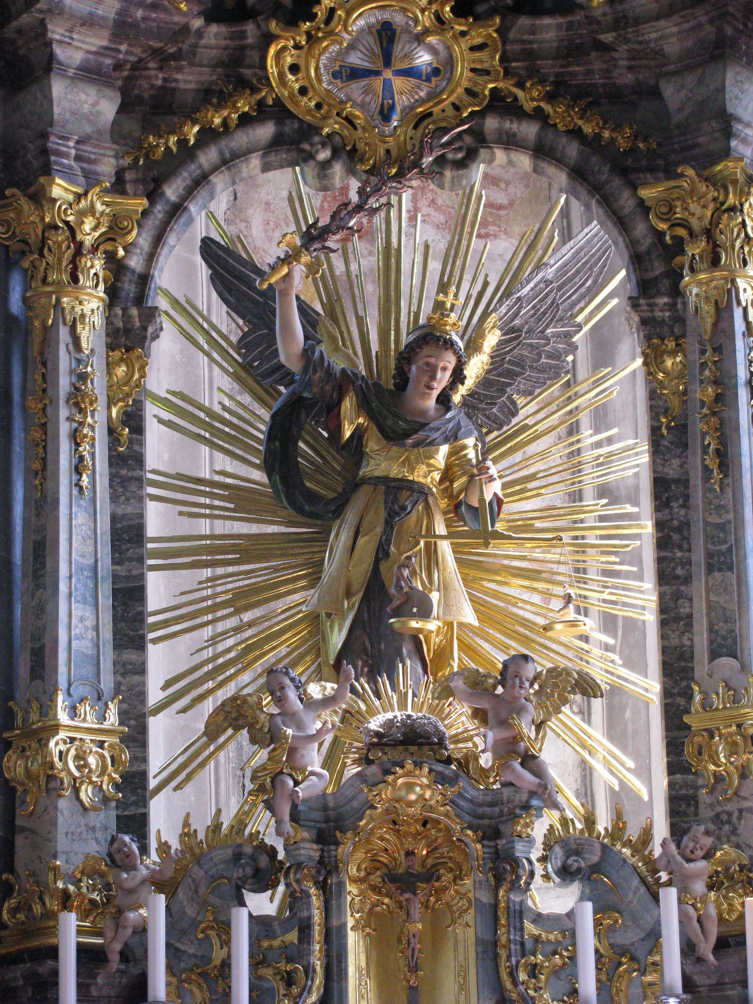 Paring, Kirche St. Michael, Hochaltar: St. Michael mit Feuerschwert und Seelenwaage